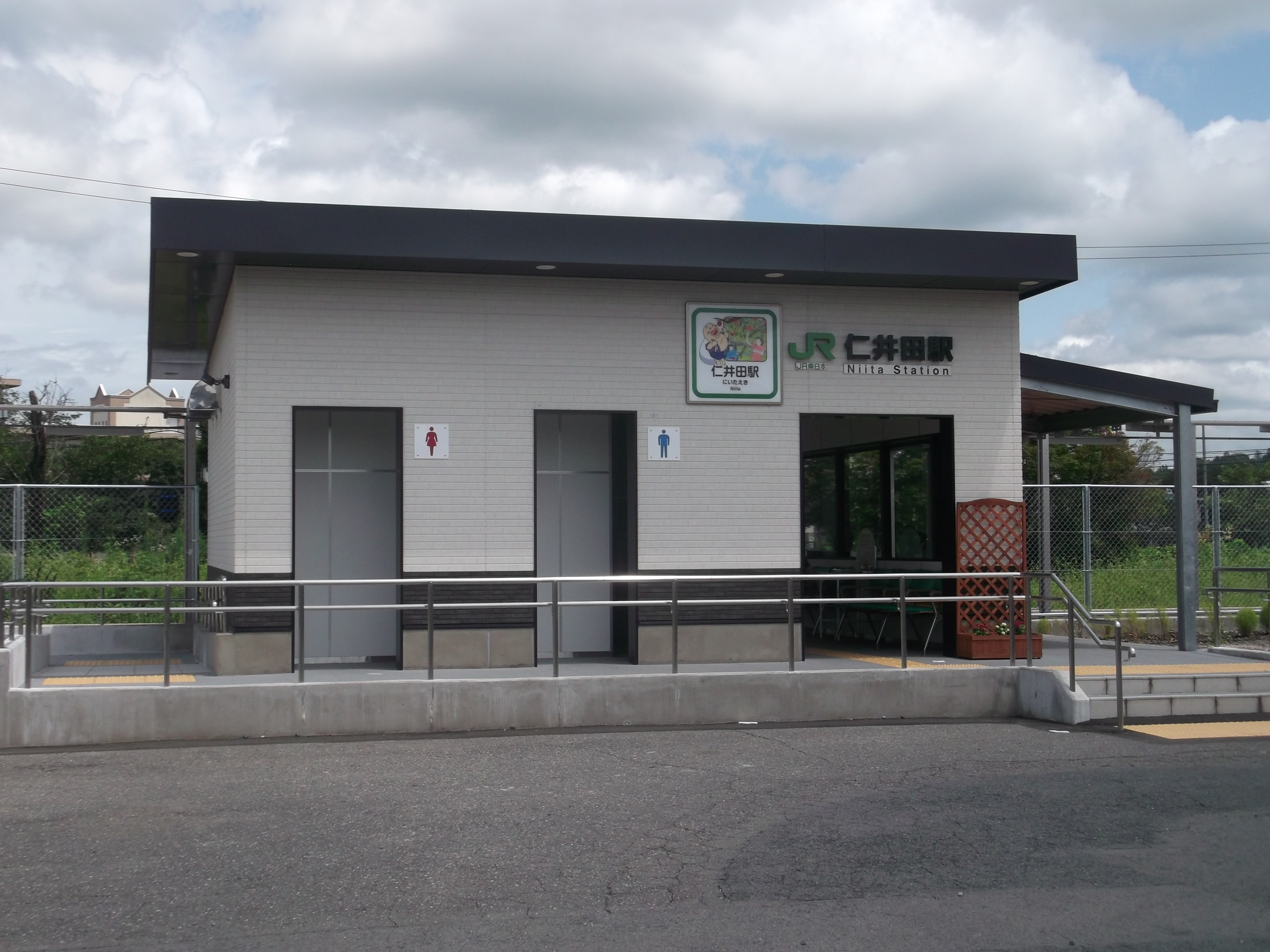 JR烏山線 仁井田駅新駅舎 2014年7月20日撮影